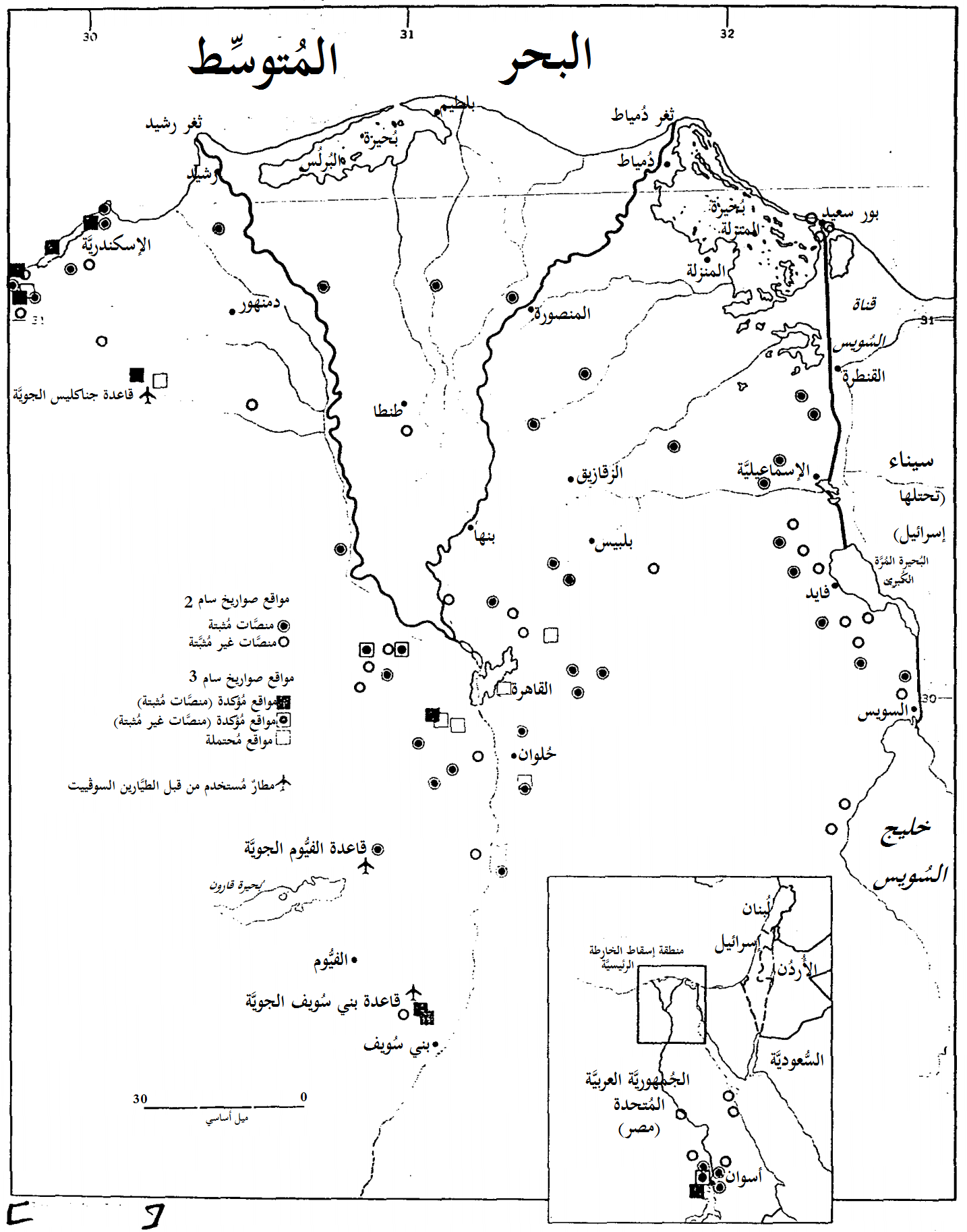 خارطة تُبيِّن مواقع صواريخ سام السوڤيتييَّة في مصر اعتبارًا من شهر أيَّار (مايو) سنة 1970م. صُنعت الصُورة الأصليَّة من قبل وكالة الاستخبارات المركزيَّة.